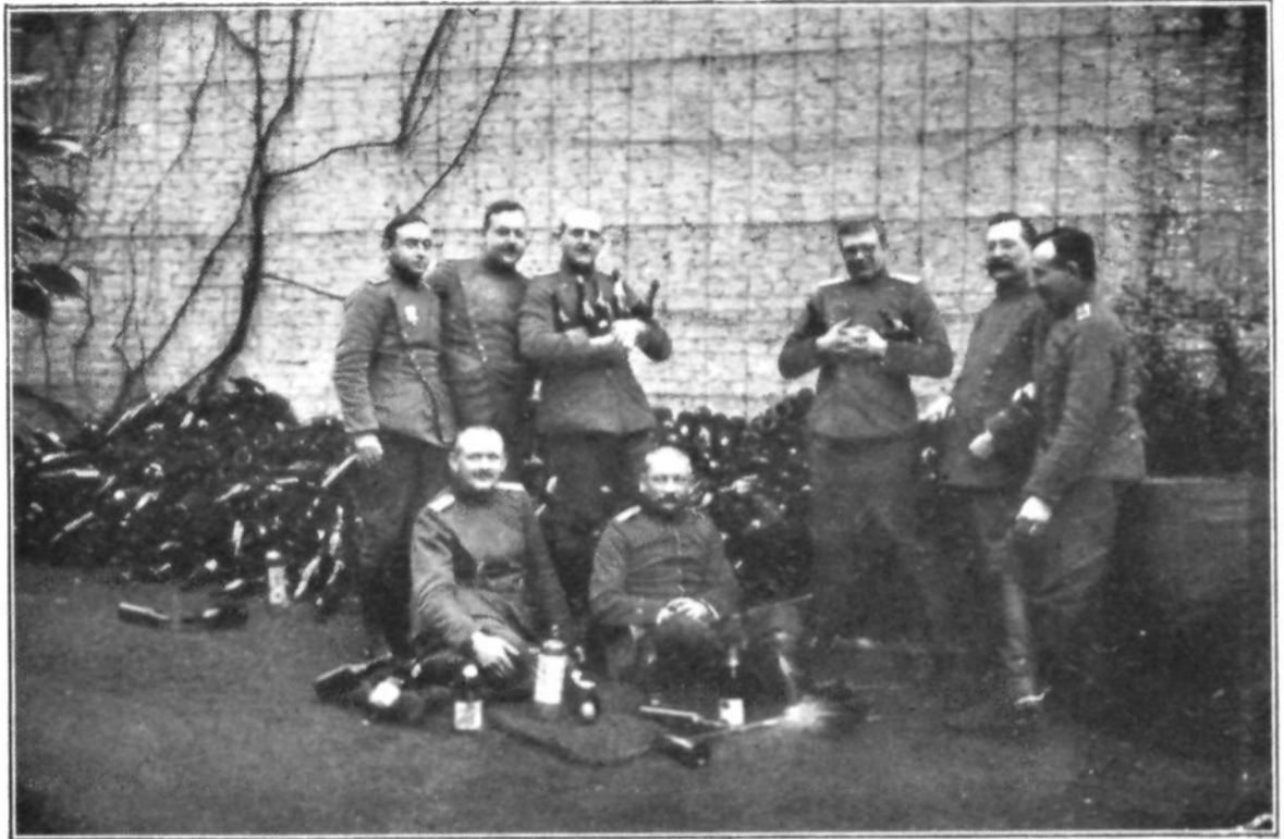 Dinant 1914 - Officiers allemands dans la propriété réquisitionnée de Georges Henry pour l'Etat-Major et le colonel Beeger, commandant militaire de Dinant.